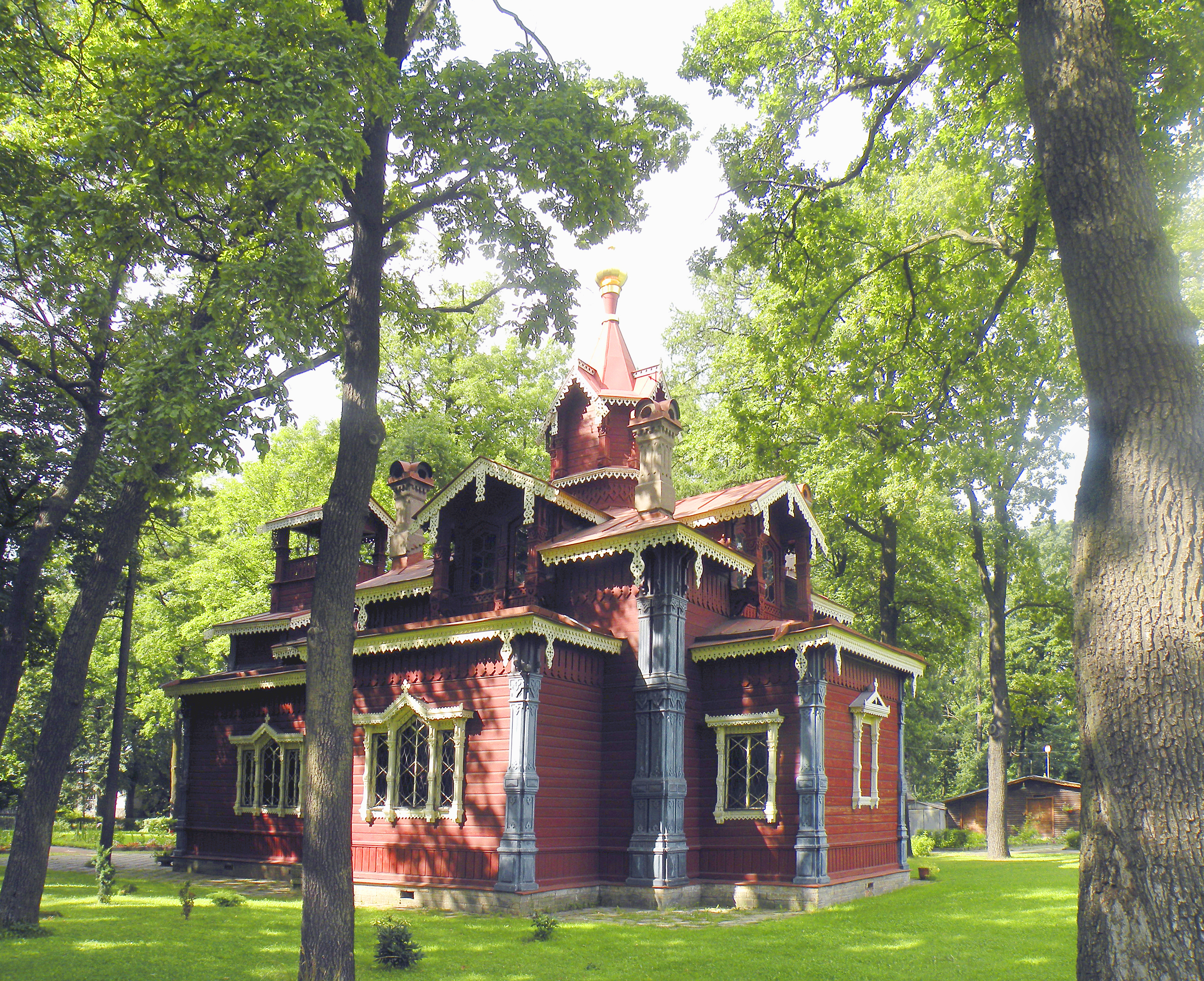 Церковь Пантелеймона Целителя при доме призрения душевнобольных Императора Александра Третьего. Архитектор Штром И. В., Фермское ш., 36к5